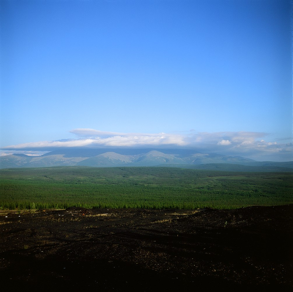 Мать-Гора, Верхоянский район This image is related to the protected area of Russia number 1420068